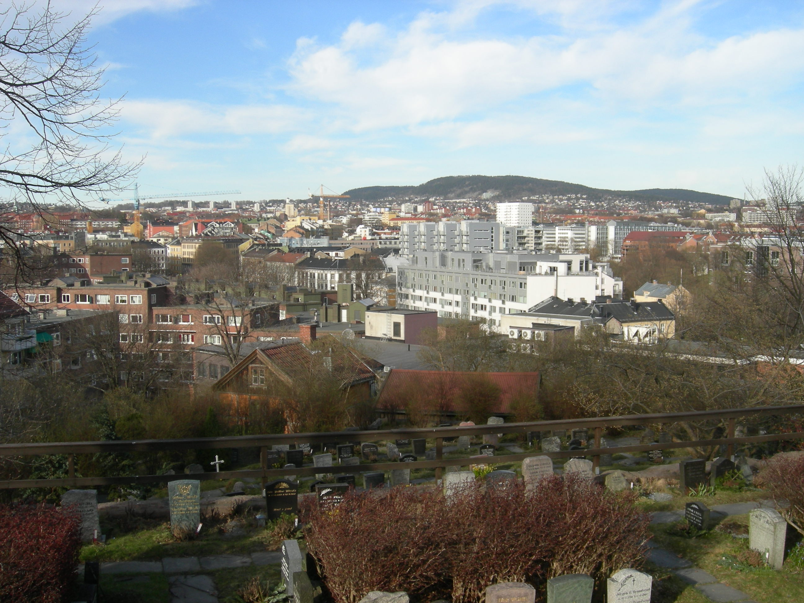 Gamle Aker graveyard, view to Grefsenåsen